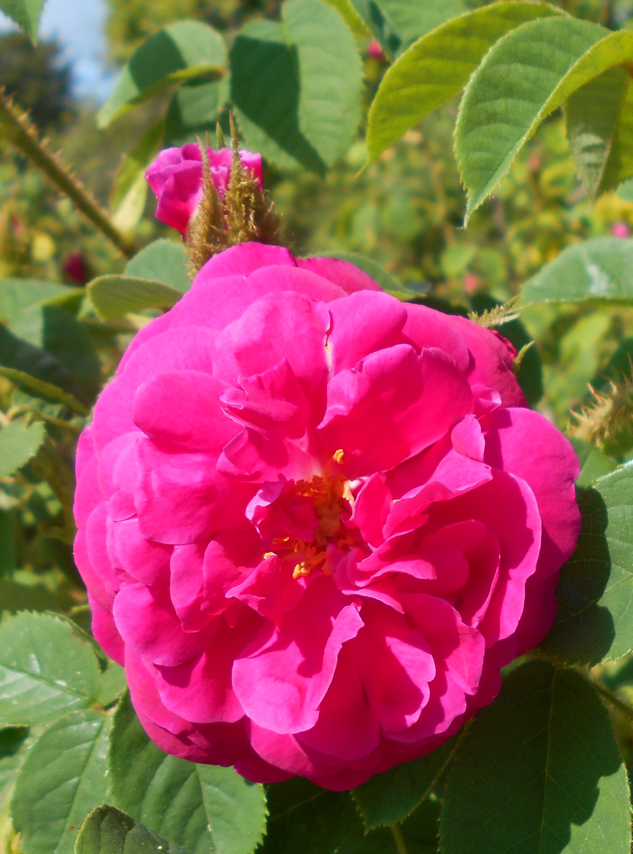 Rosa centifolia muscosa ‘Mme William Paul’, Botanischer Garten Berlin.